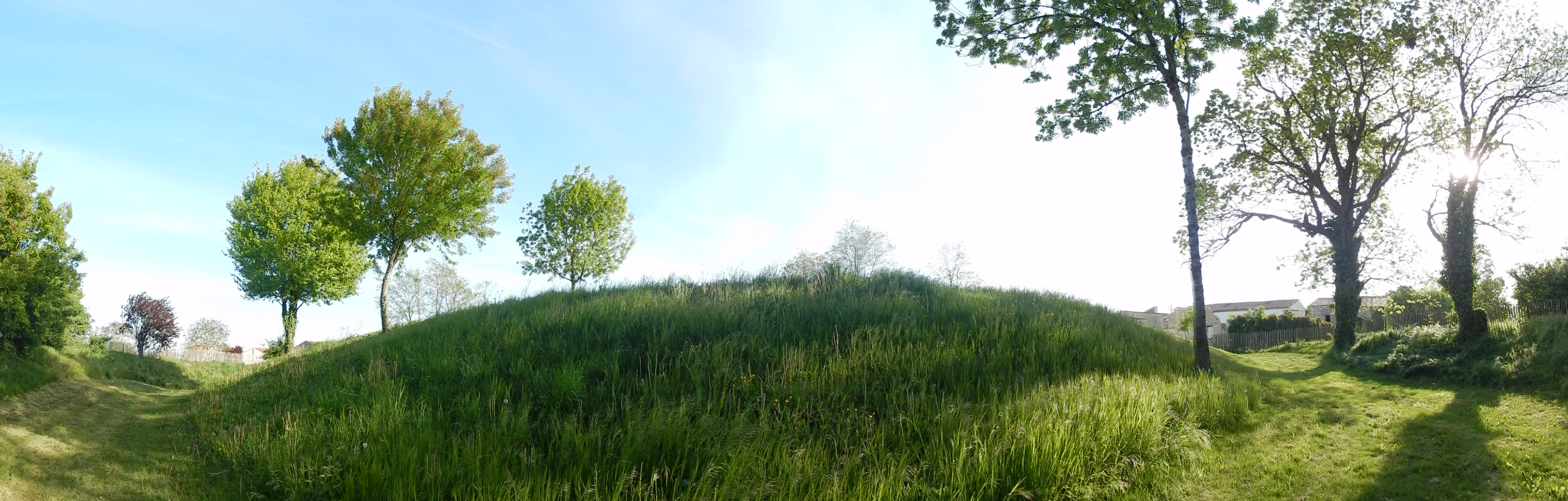 Ce qu'il reste de la motte féodale de La Croix-Comtesse (Charente-Maritime, France). Photo prise en mode panoramique.